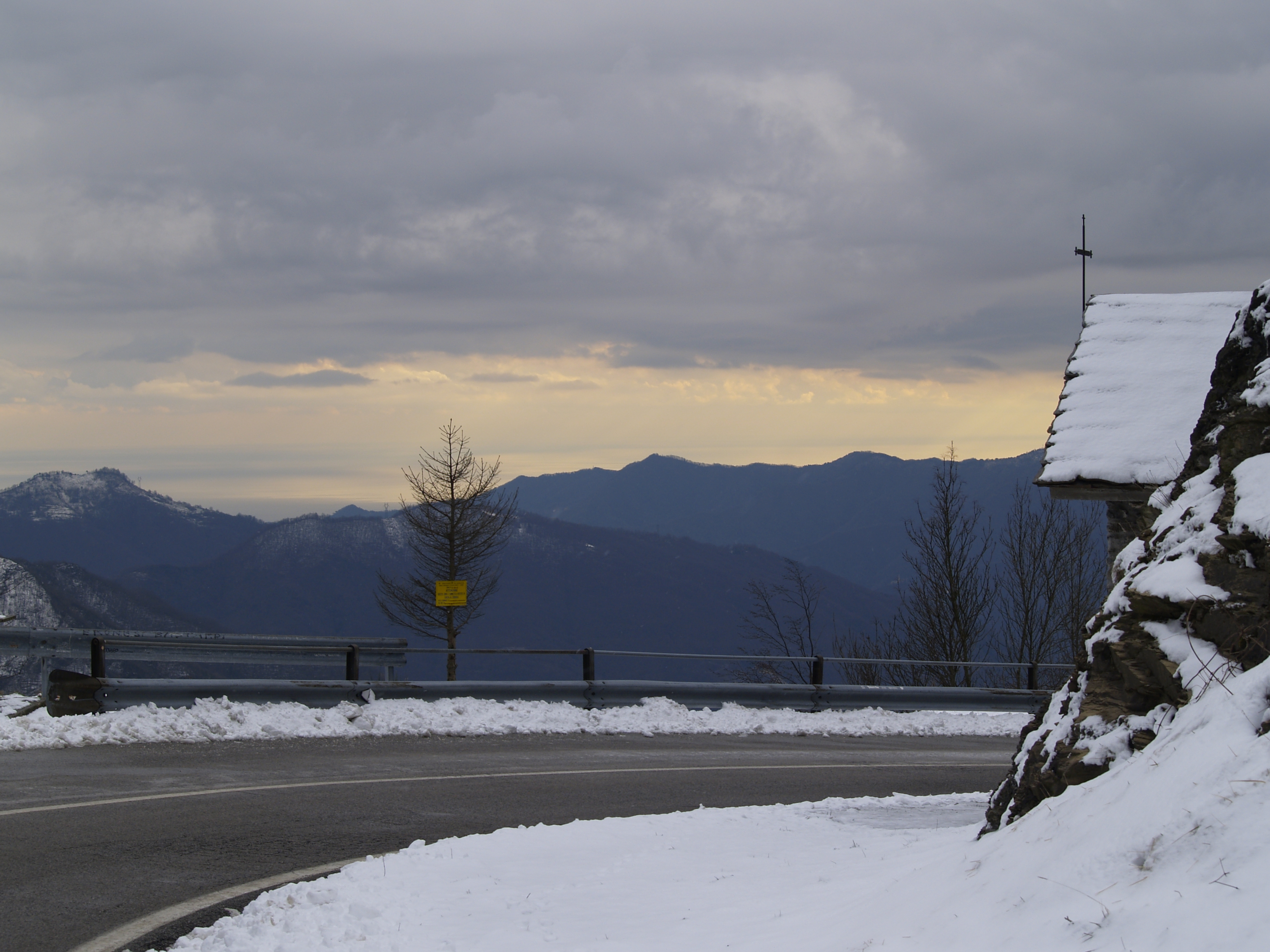 Il passo della Scoglina